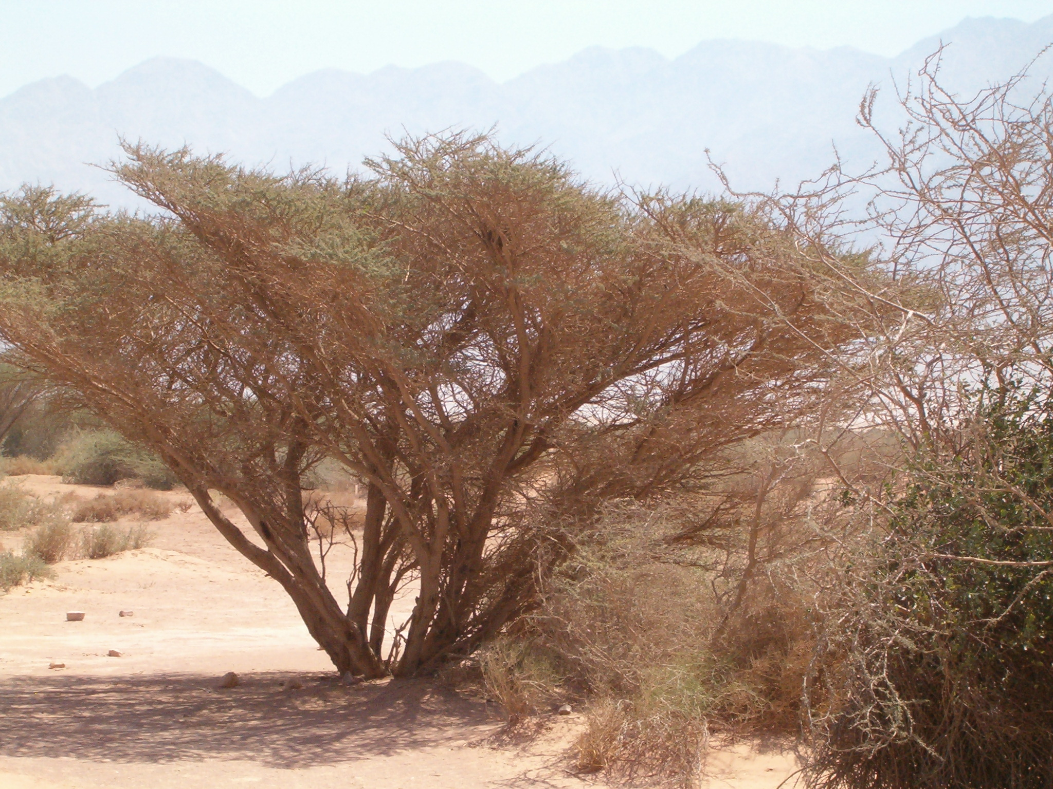 שיטת הסוכך בעברונה בדרום הערבה כעשרים קילומטר צפונית לאילת. צילם י.ש. 23:06, 16 מאי 2006 (IDT)